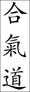 Aikido geschreven in kanji.